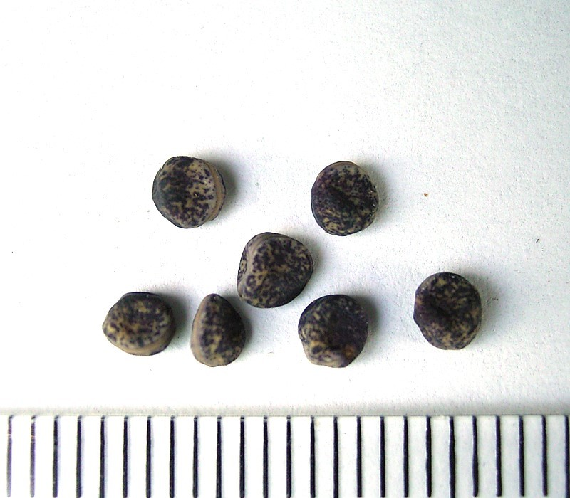 Vicia sepium